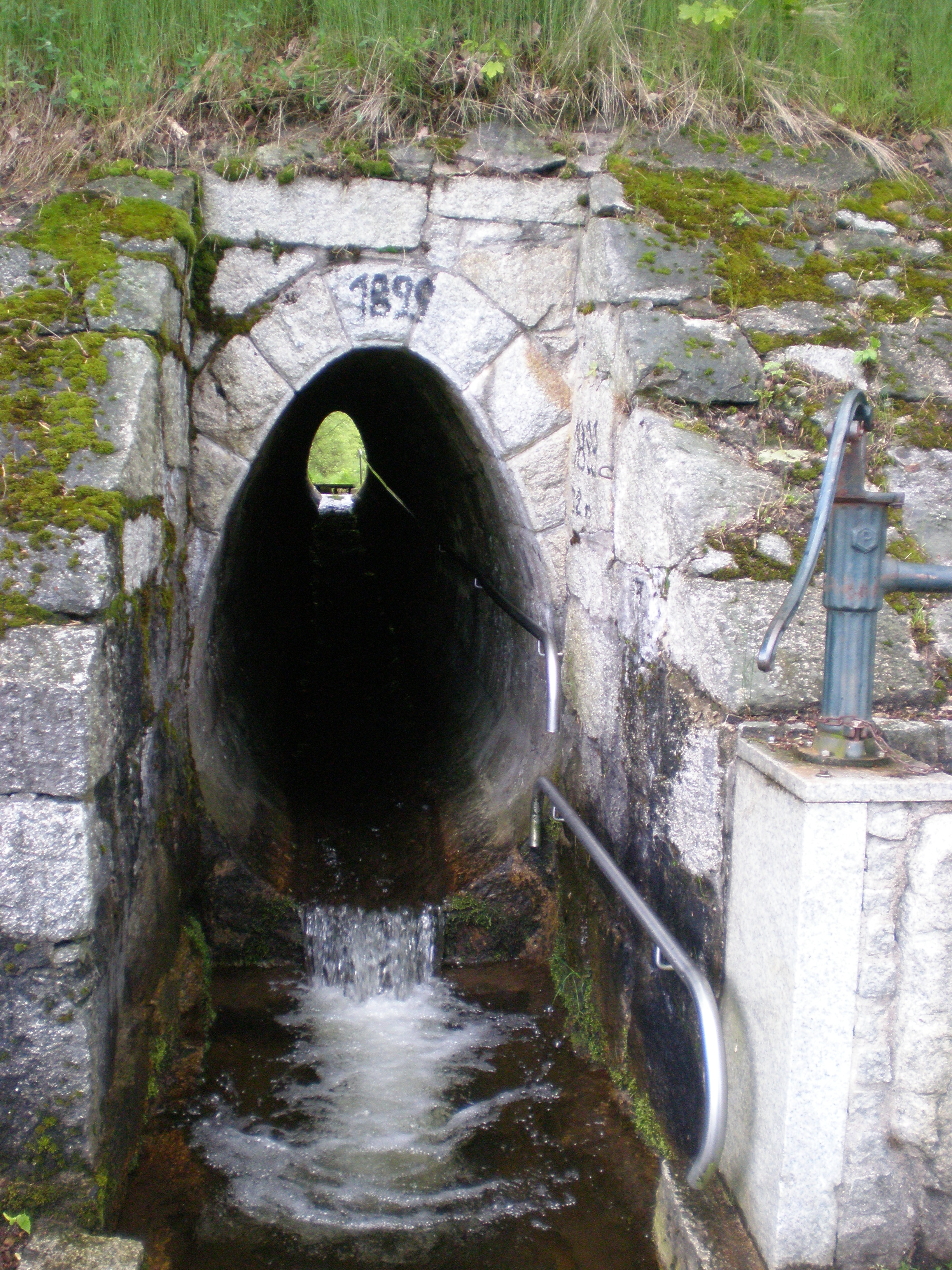 Der Bachdurchlass im Bahndamm bei Kleinschloppen